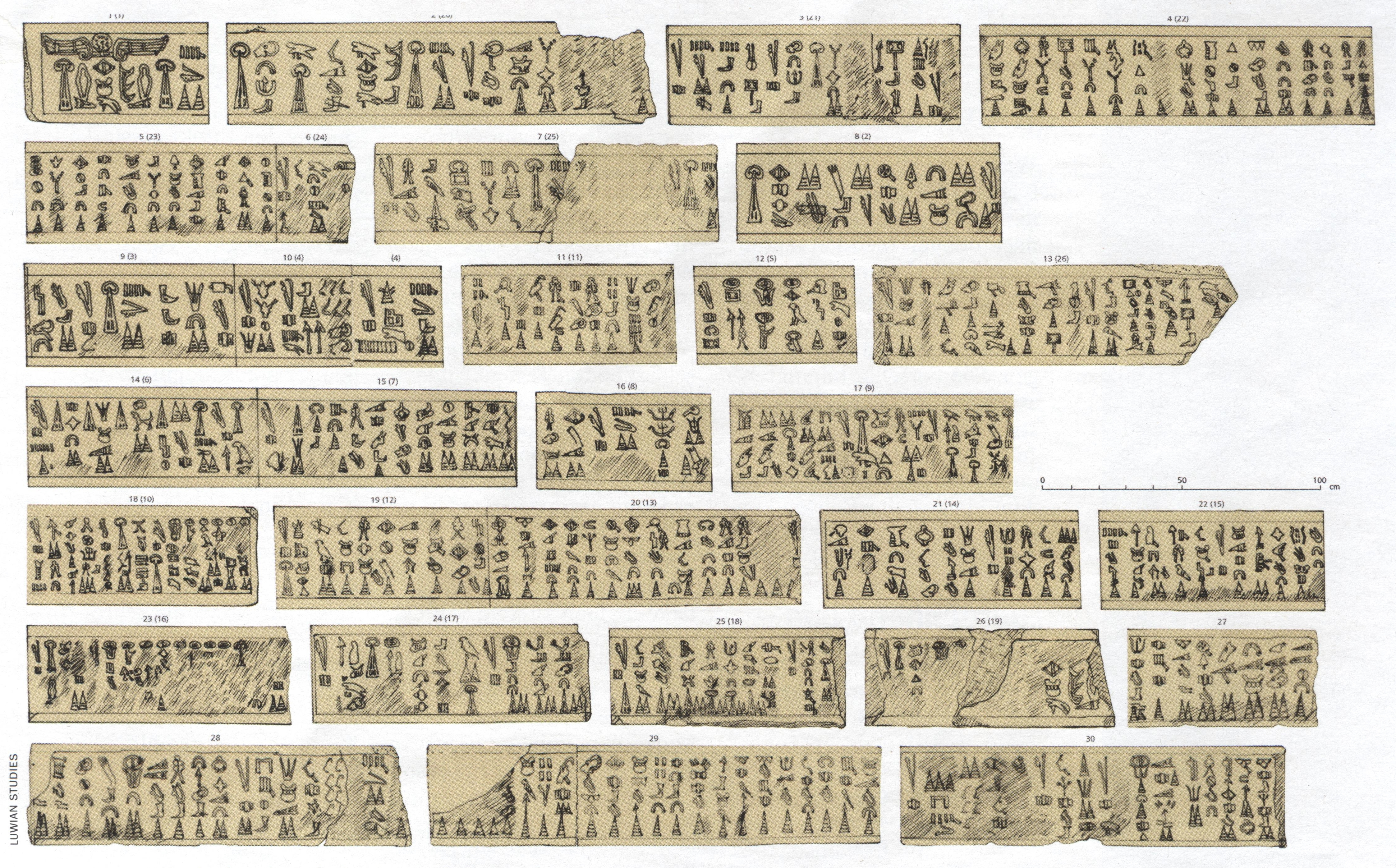 Abzeichnung einer Hieroglyphen-Luwischen Inschrift aus Beyköy, Türkei